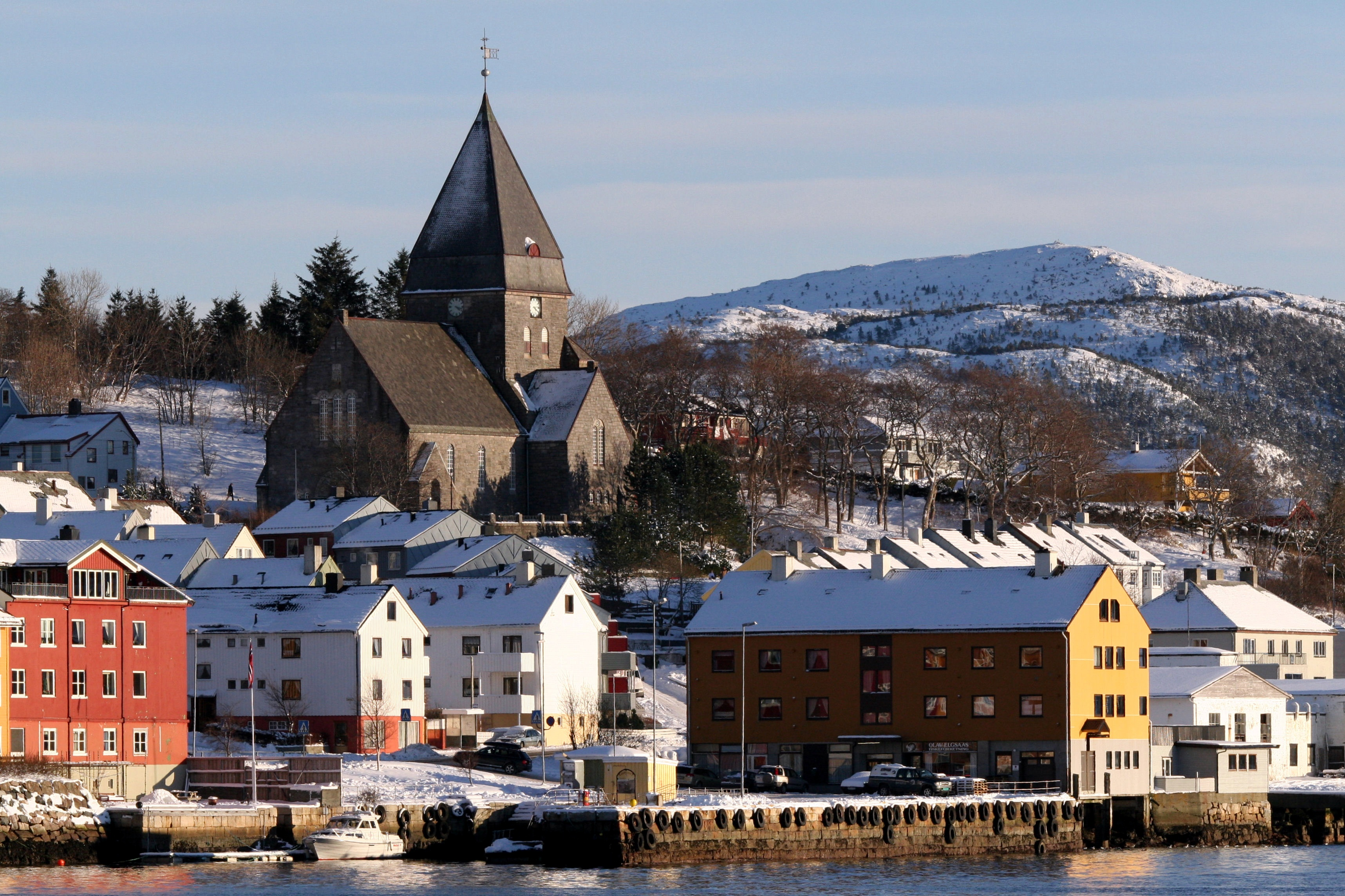 Kerk uit 1914, ontsnapte aan de bombardementen van WO II. Glasramen van Vigeland. Opname maart 2006